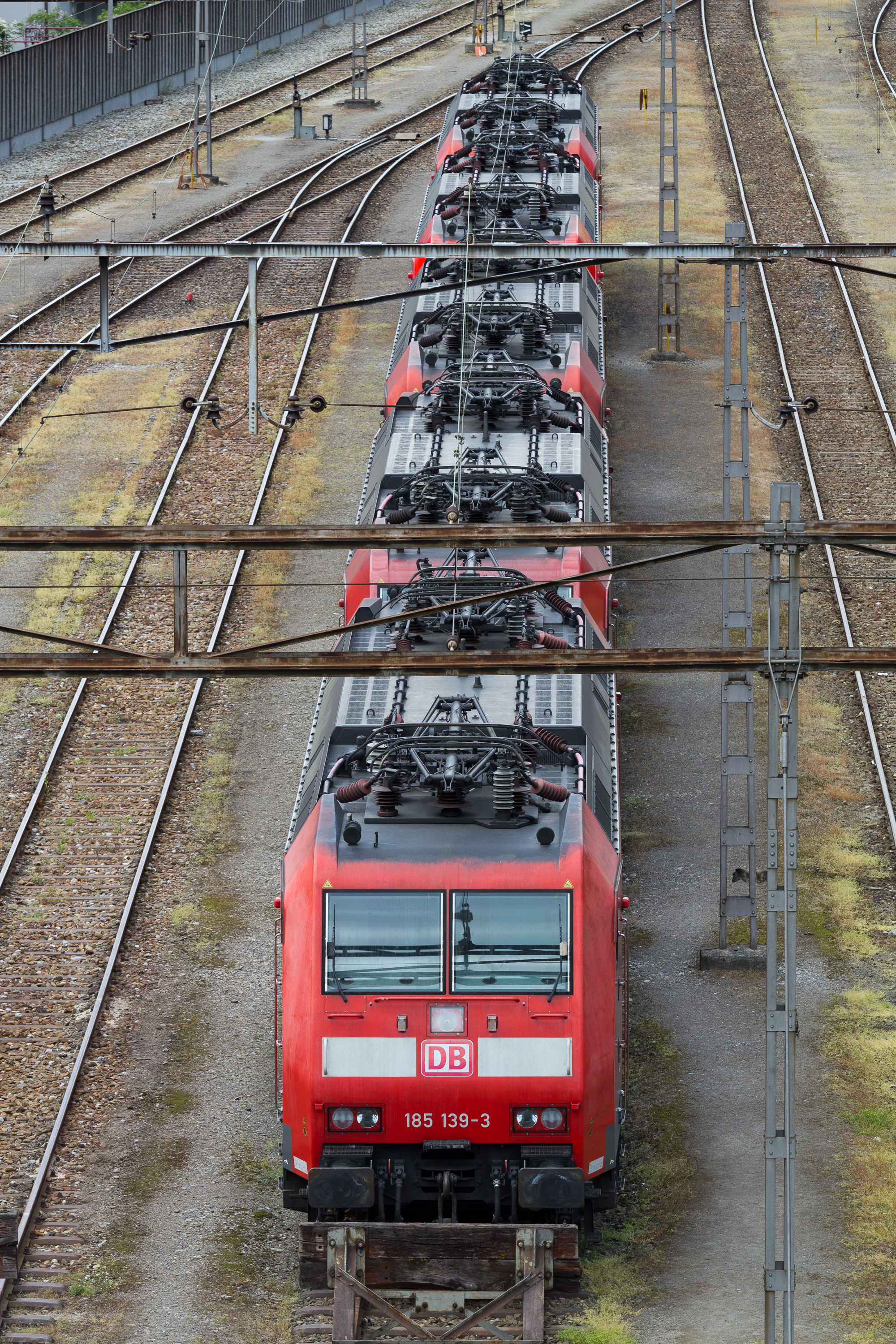 DB BR 185 aufgereiht in Erstfeld UR / Schweiz